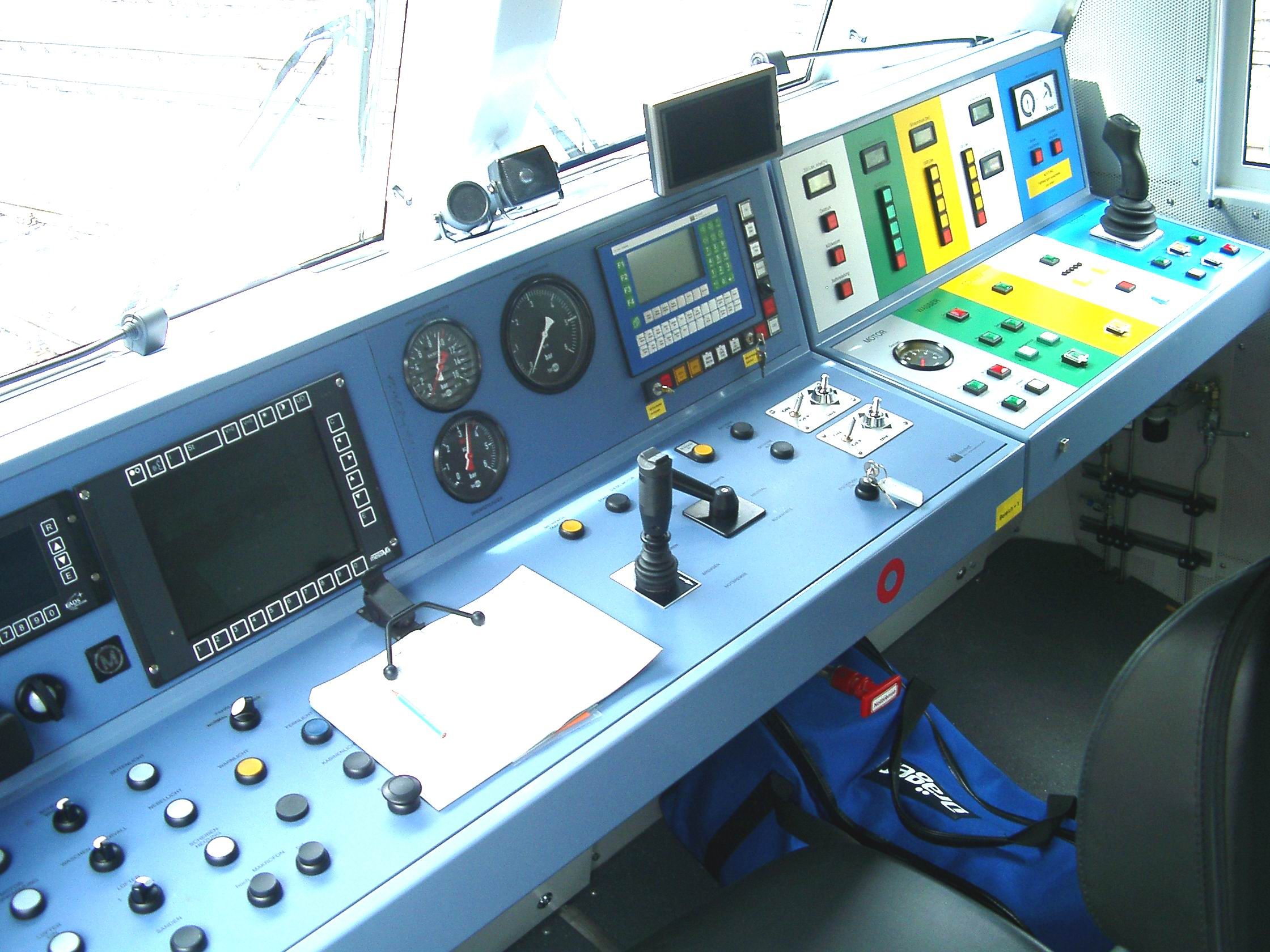 Lösch- und Rettungszug der BLS: Einer der Führerstände mit Bedienteil für Löschtechnik